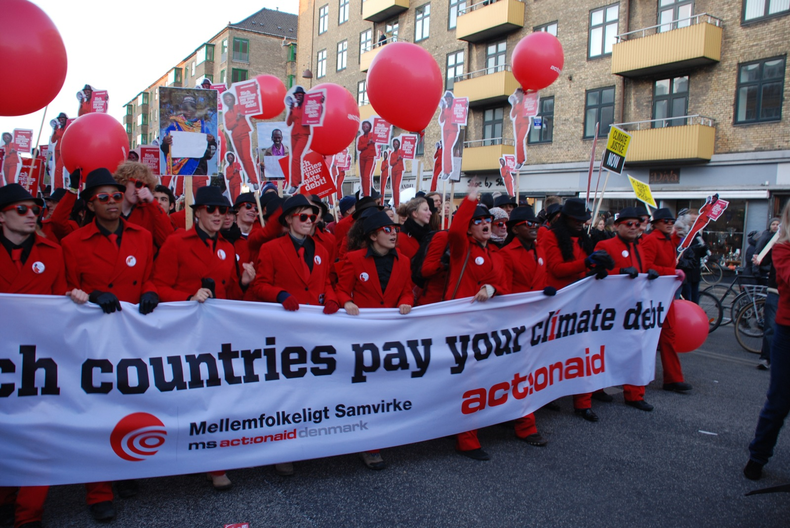 Mellemfolkeligt Samvirke Action Aid block at COP15